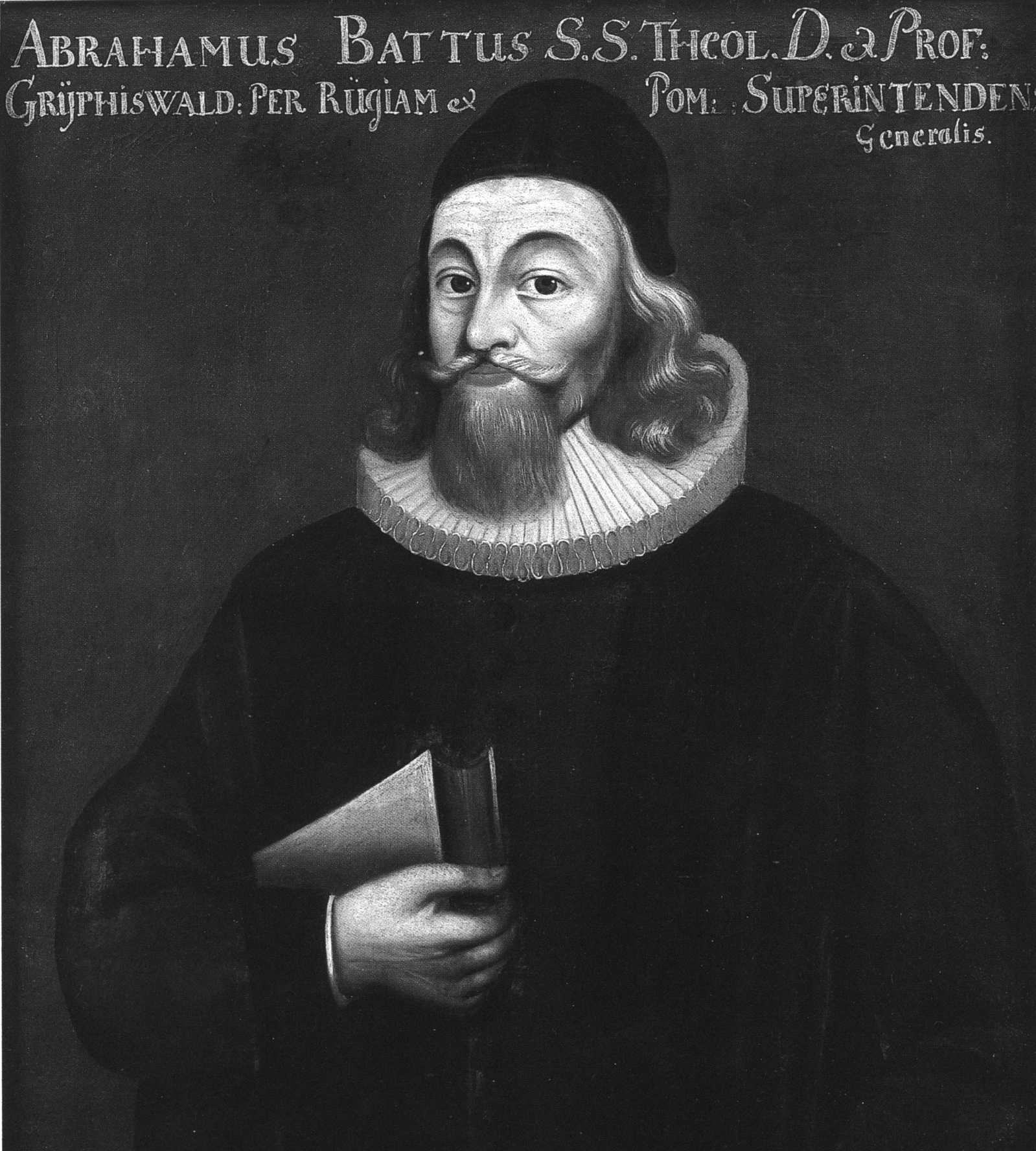 Bildnis des Greifswalder Professors Abraham Battus (1606–1674)